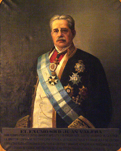 Cuadro del escritor Juan Valera en Instituto Aguilar y Eslava-Cabra